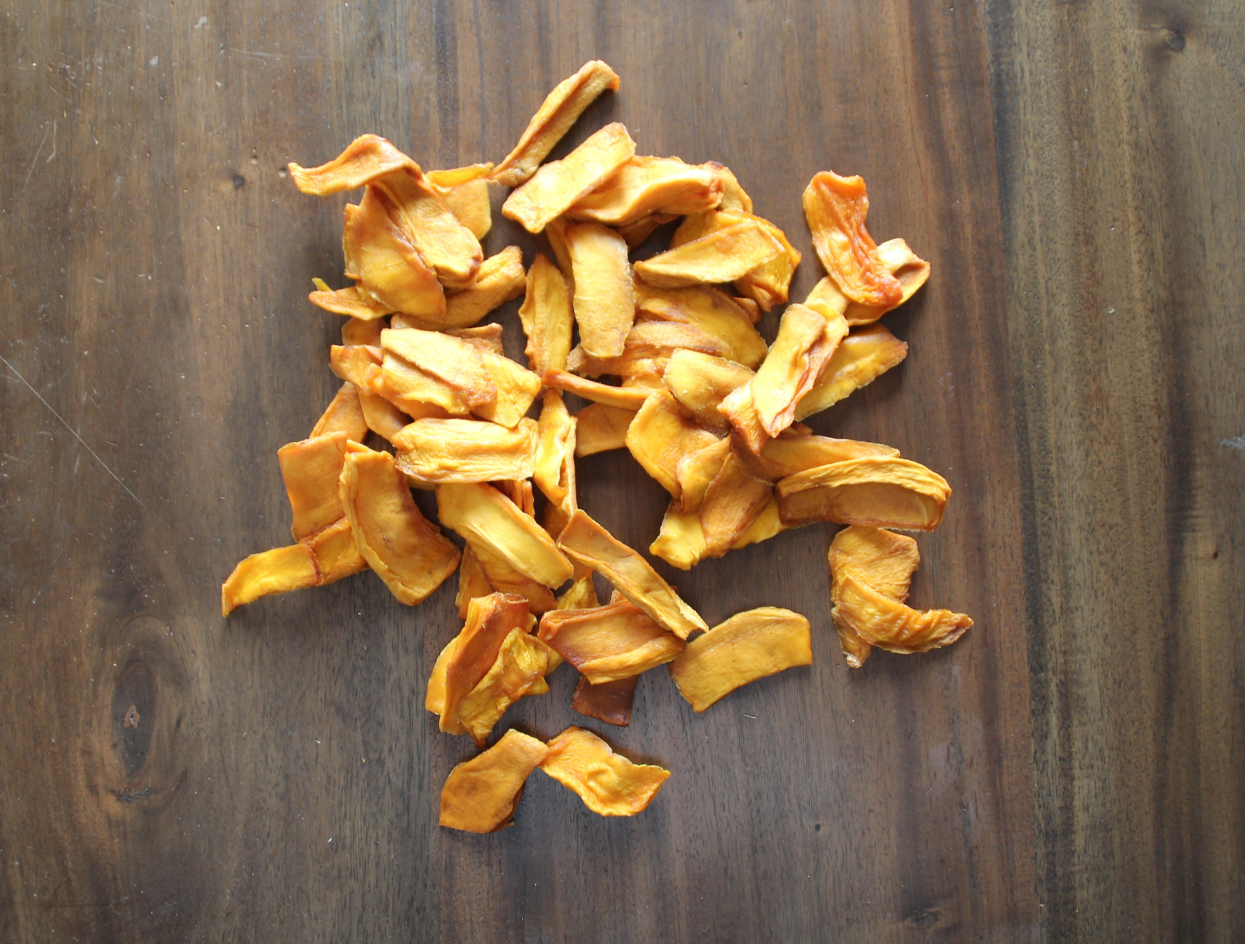 Dried Mango